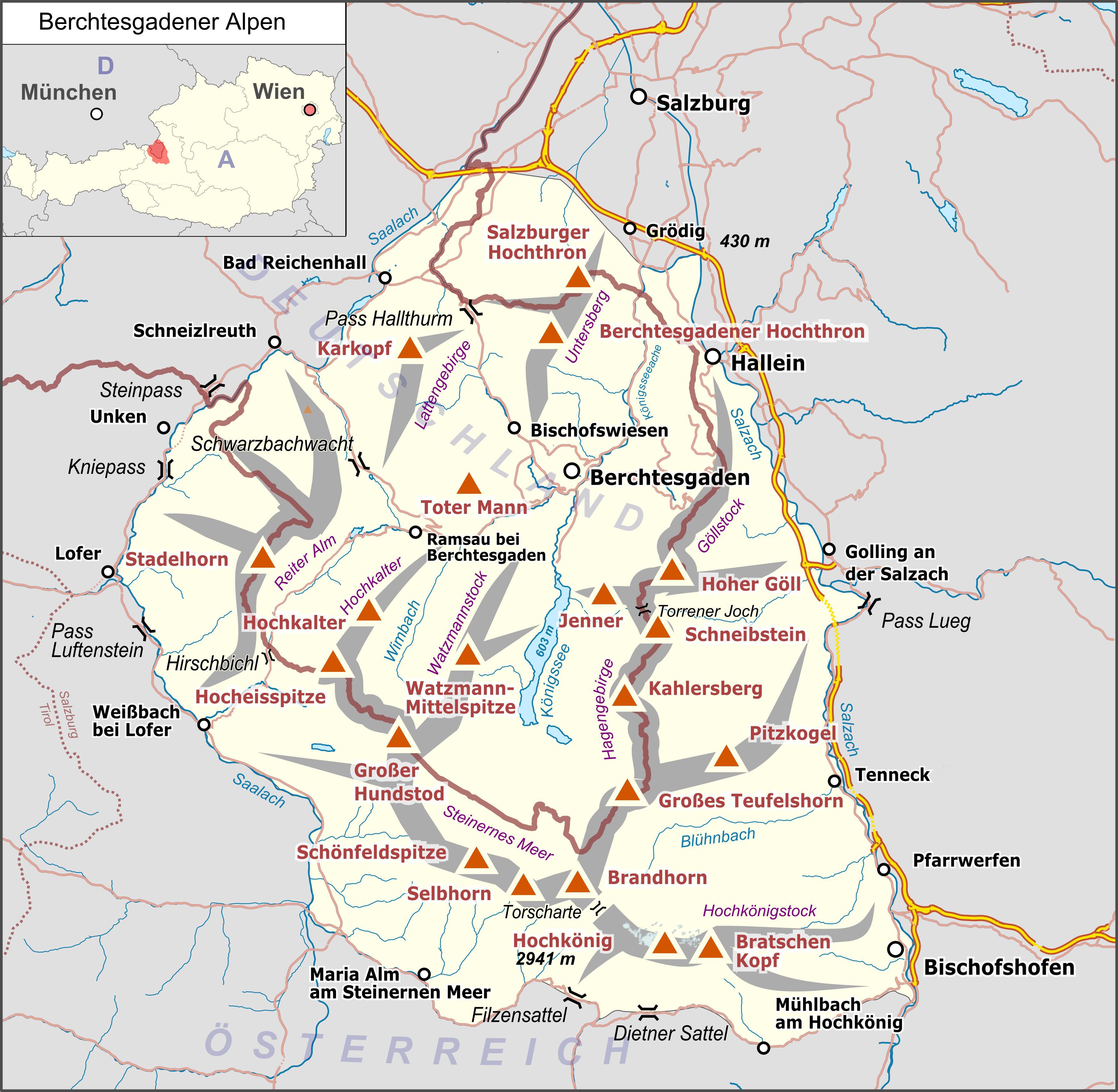 Übersichtskarte der Berchtesgadener Alpen.